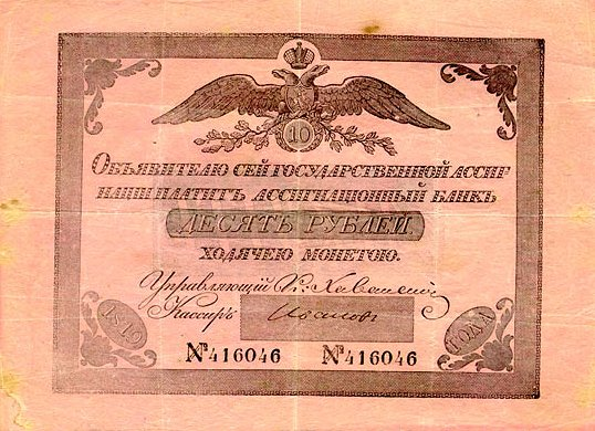 10 рублей 1819. Аверс.